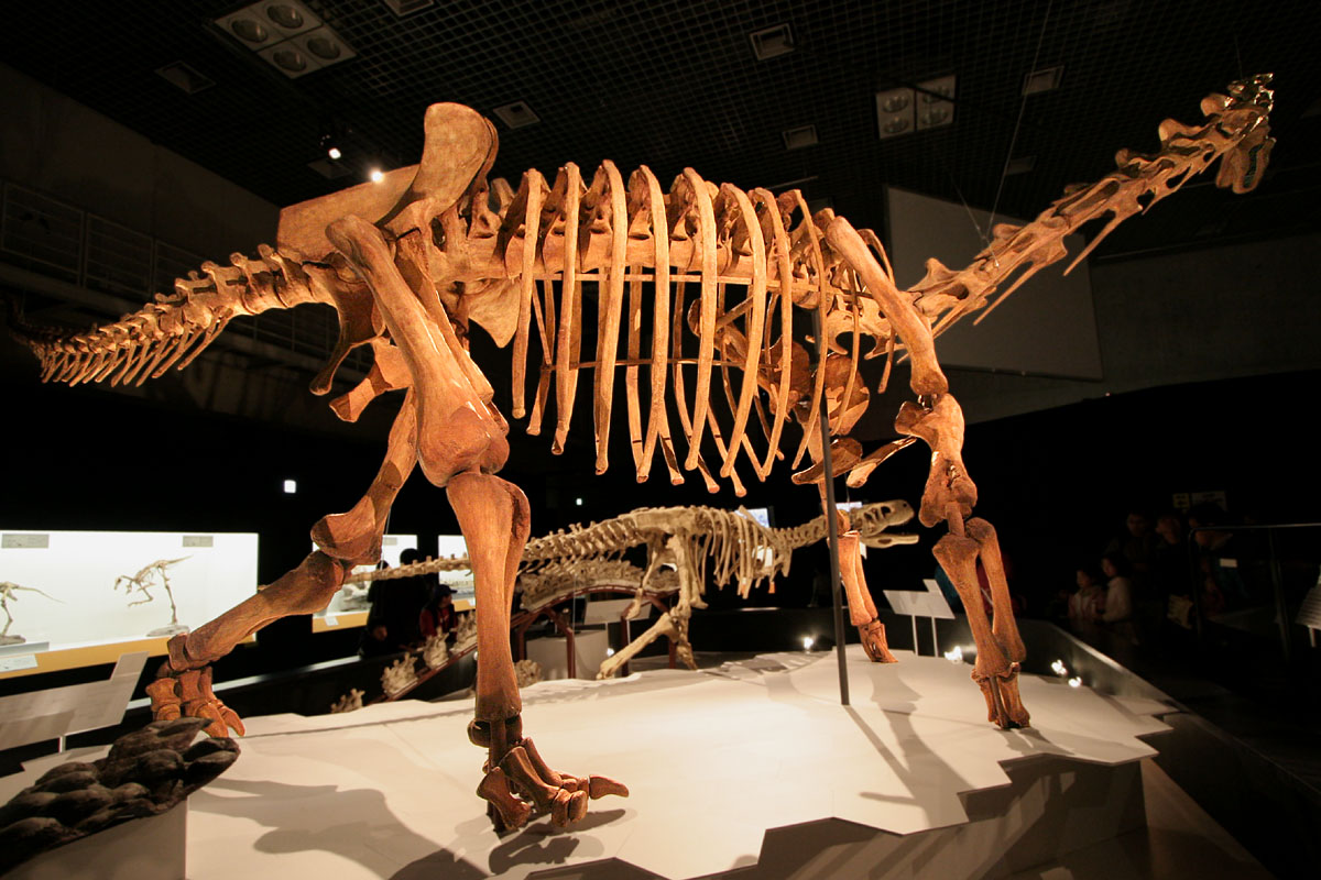 Maxakalisaurus - 02